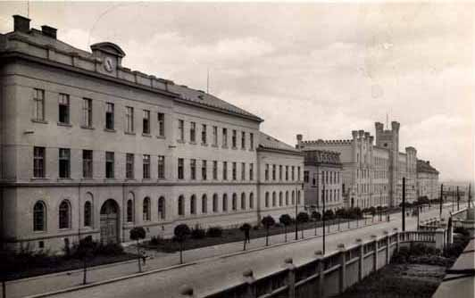 Infanterie-Kaserne in Jungbunzlau